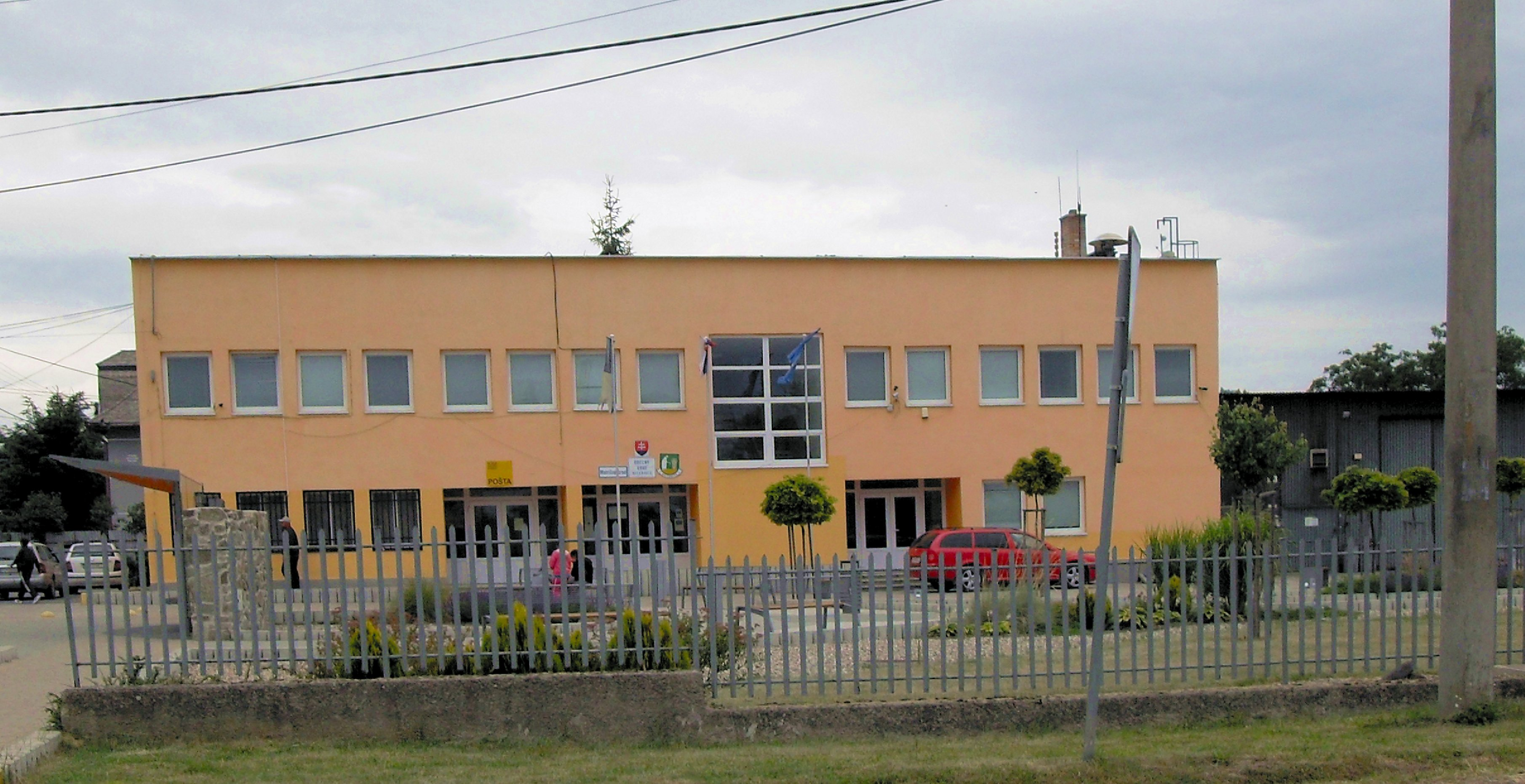 Obecný úrad v Kecerovce